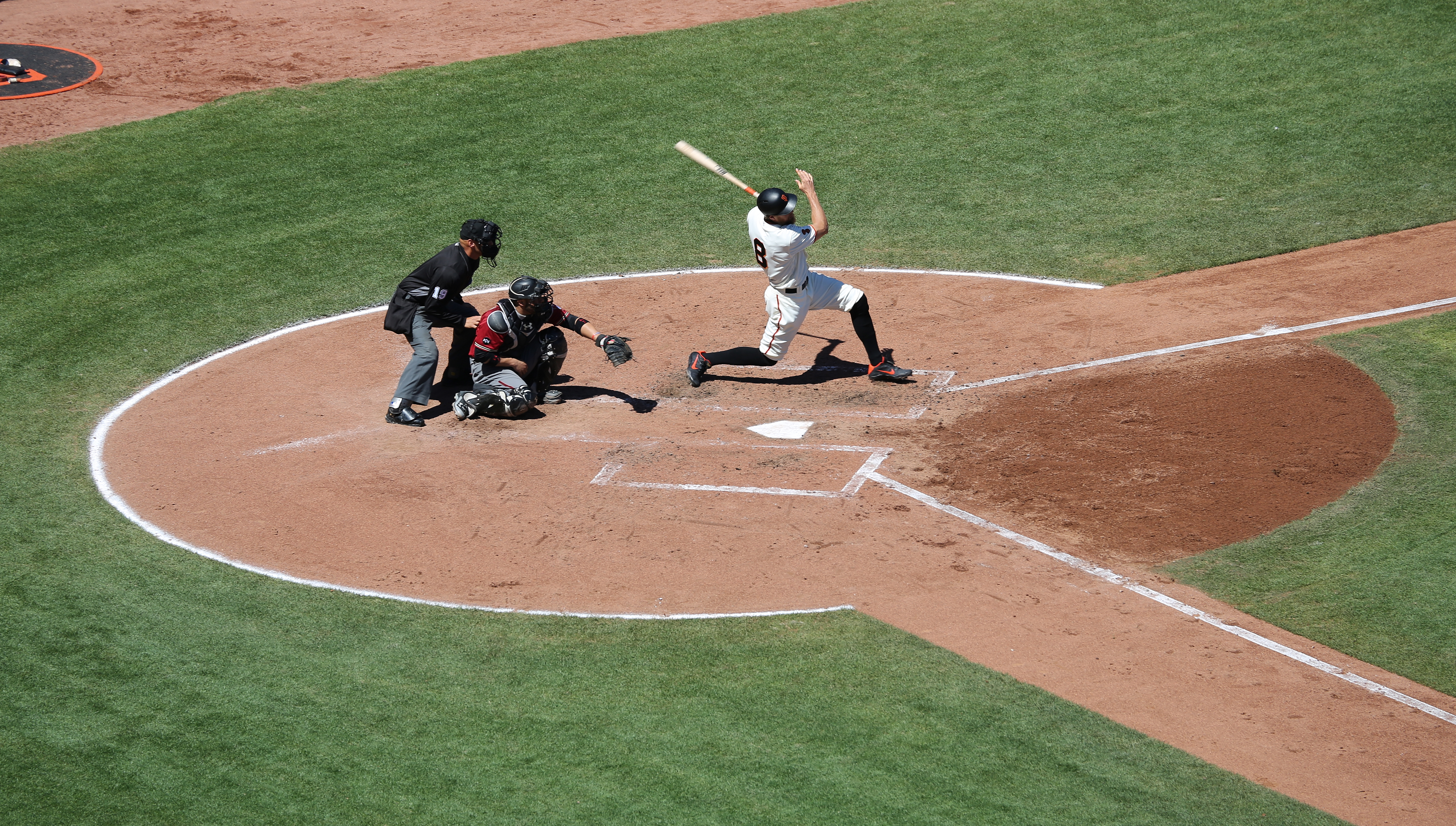 Baseball at AT&T Park (TK16)